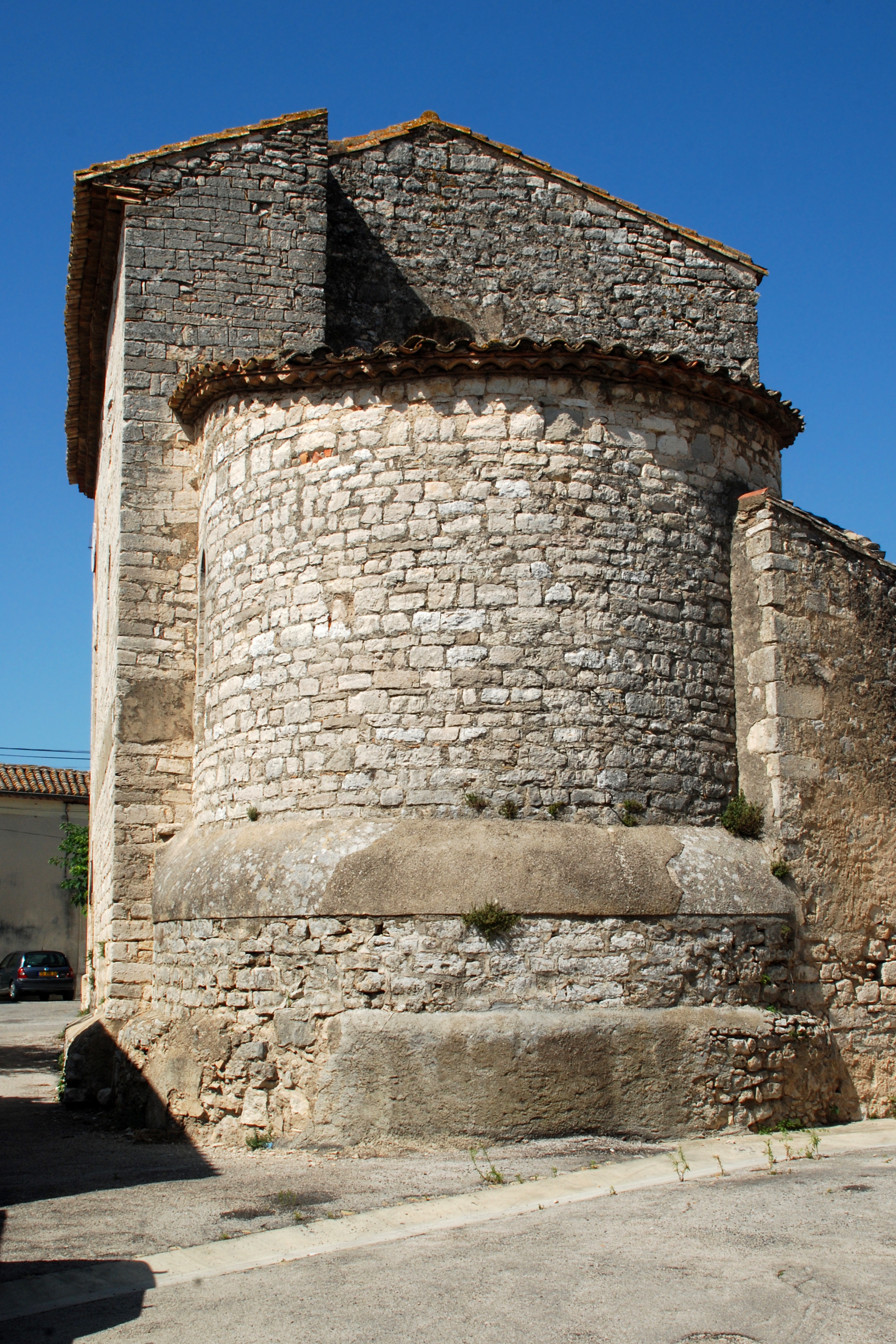 France - Hérault - Église Saint-Nazaire-et-Saint-Celse de Buzignargues